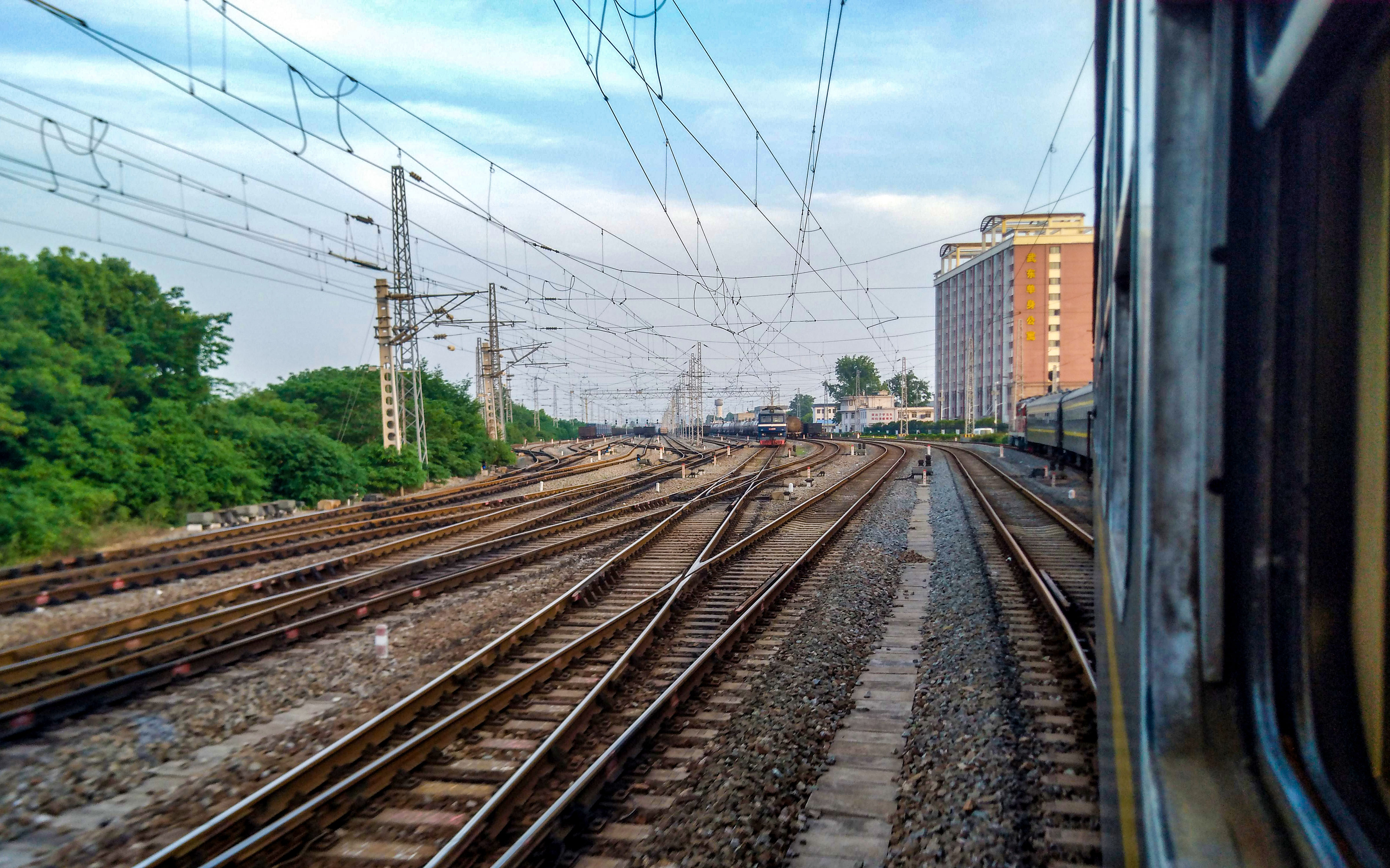 武昌南环、北环铁路市郊列车停运的前一天，DF7C5230 牵引流芳站开往何刘站的 8318/9 次市郊列车进入武昌东站